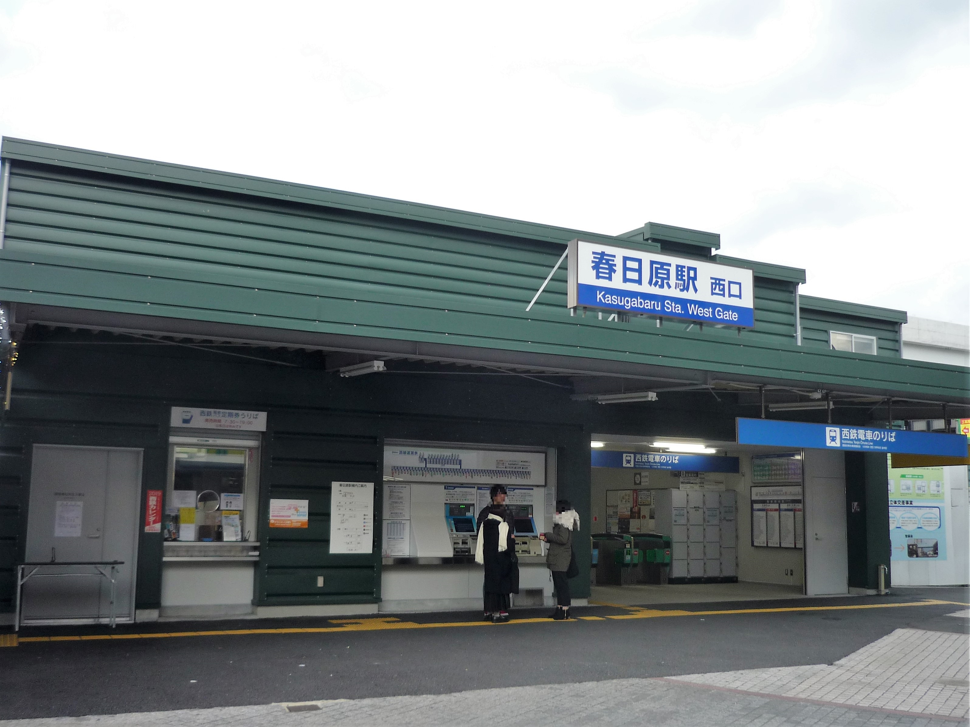 西鉄・春日原駅西口の仮駅舎 Panasonic Lumix DMC-FS3